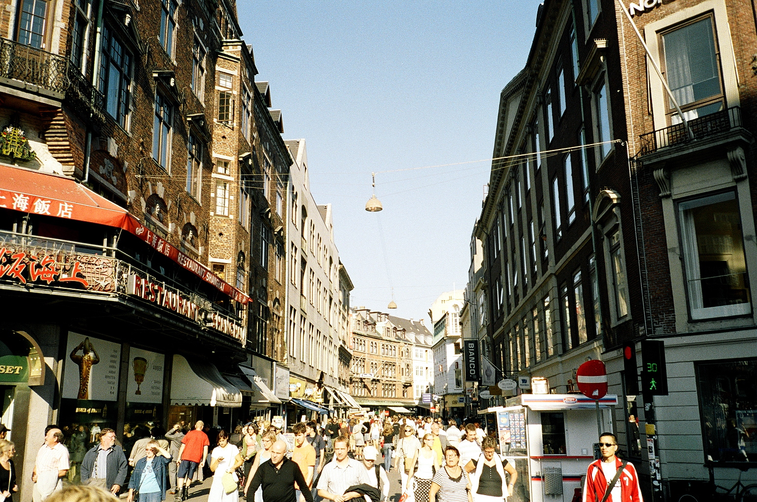 Pėsčiųjų gatvė Kopenhagoje